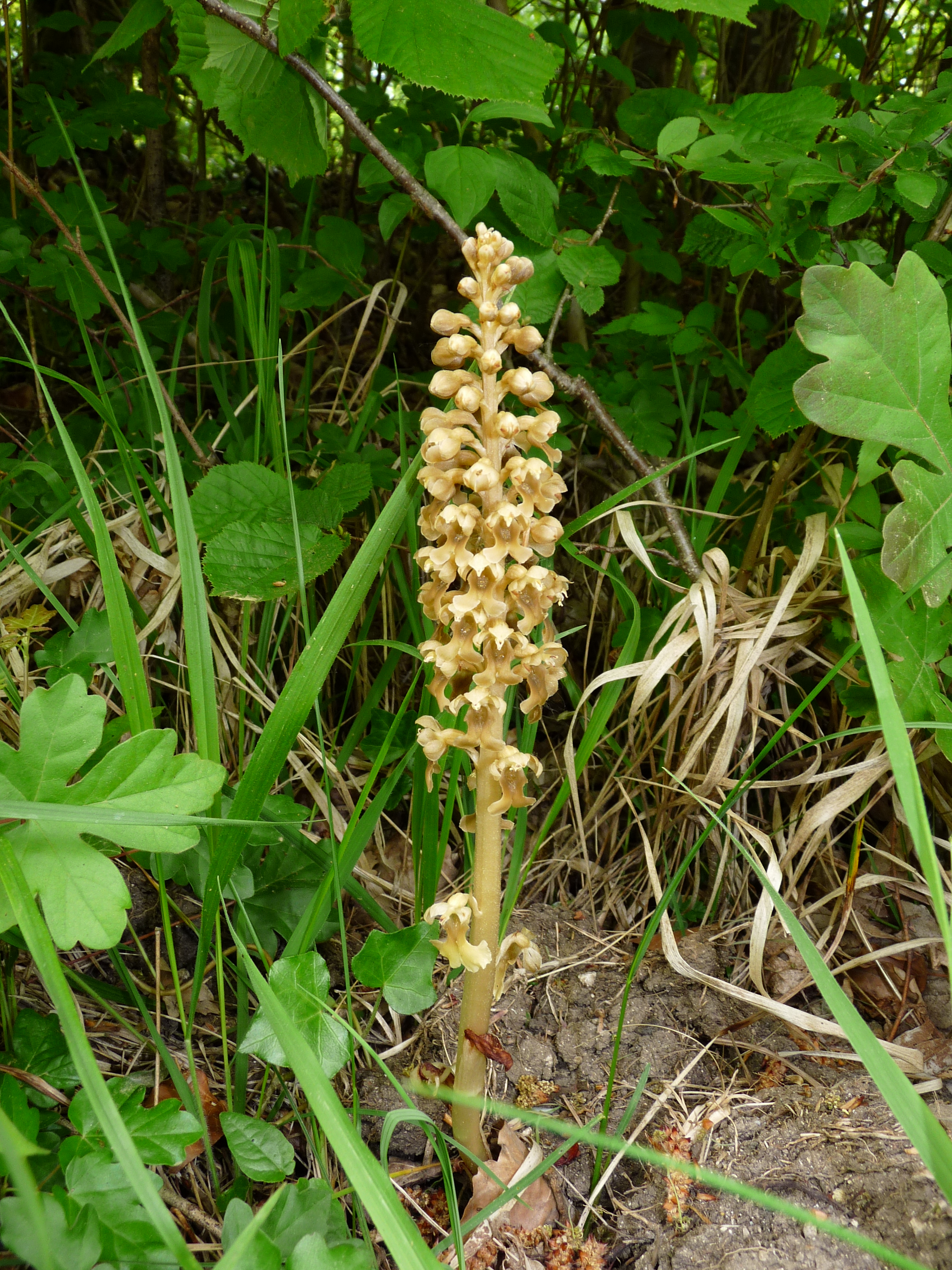 Neottia nidus-avis à Charmes-la-Côte (54113, Meurthe-et-Moselle, Lorraine, France).